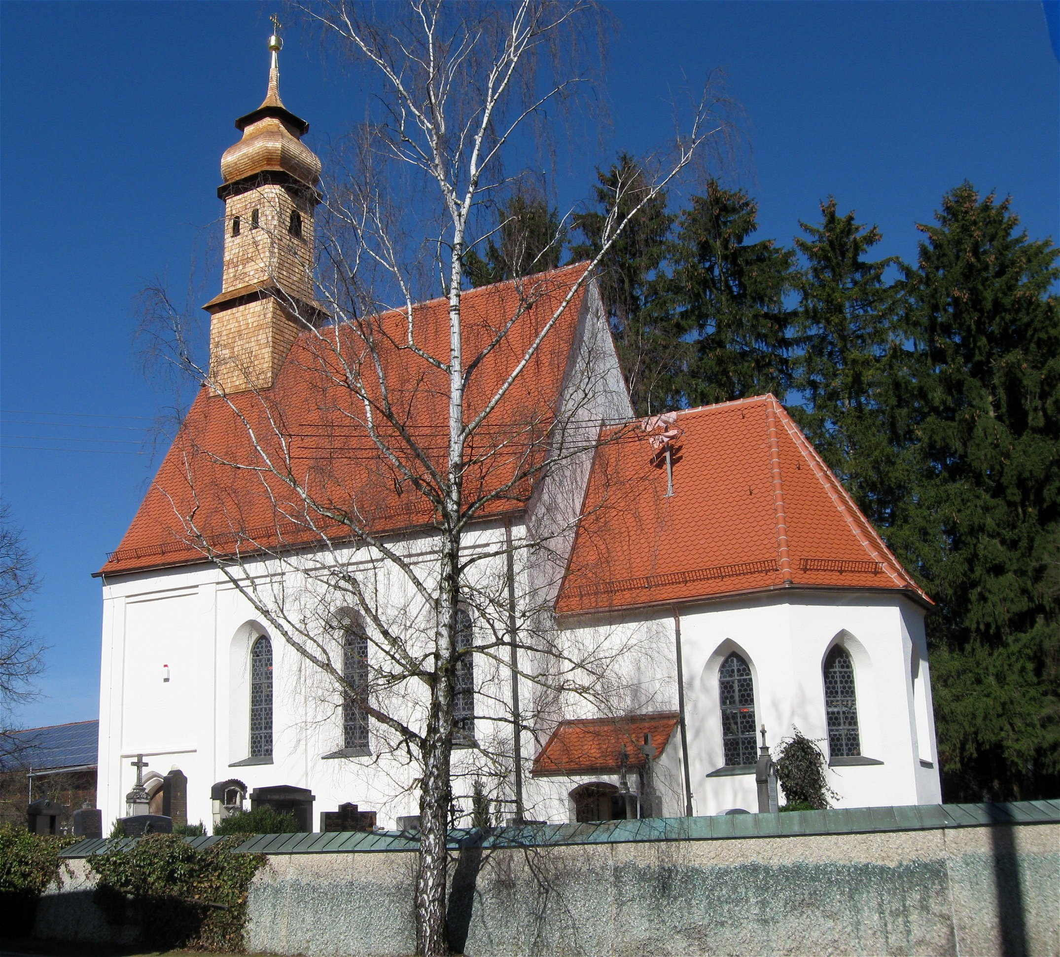 Oberhaching; Oberbiberg: Kath. Filialkirche Mariä Geburt; spätgotisch, Anfang 16. Jh.; mit Ausstattung